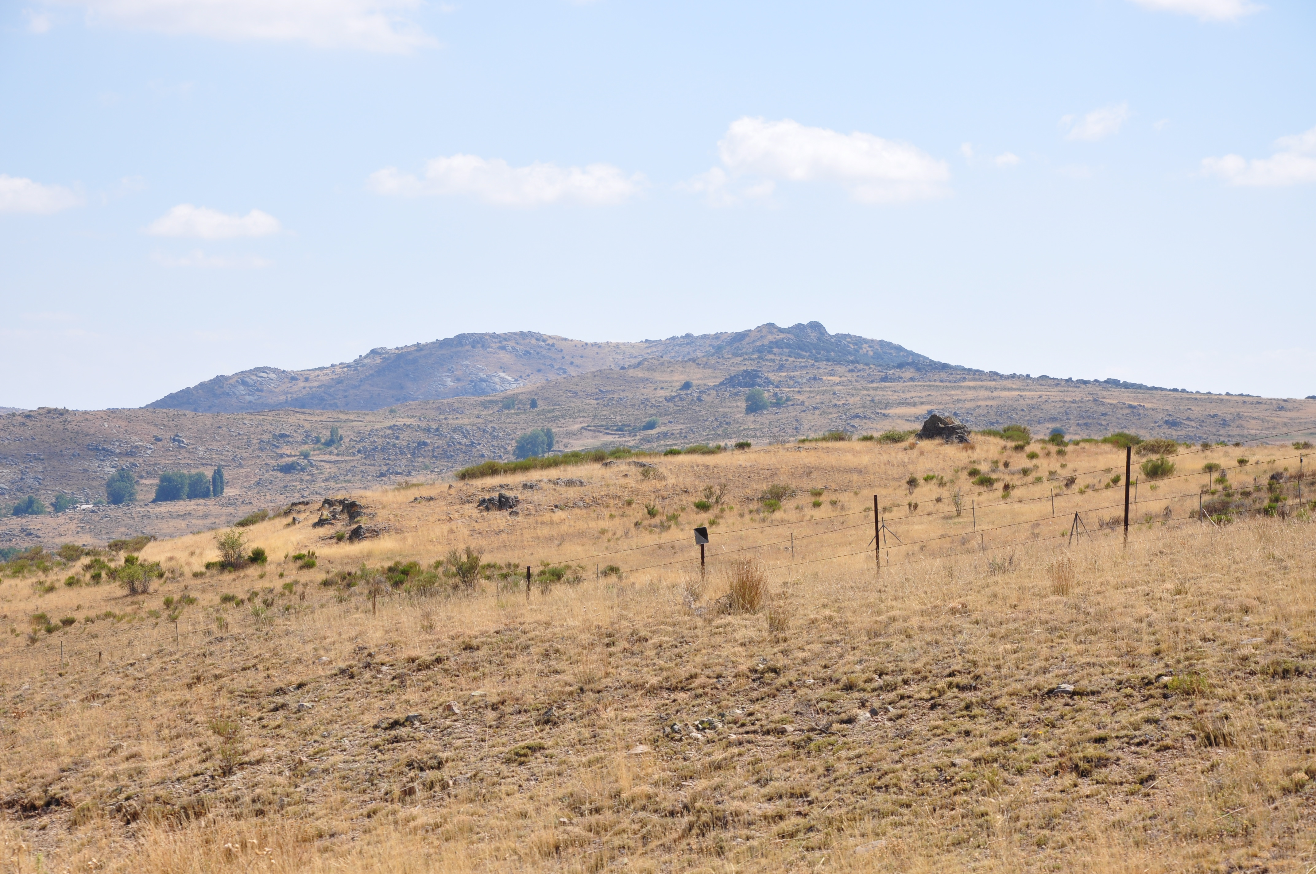 Sierra de Ávila, vista del sector del Cid, Los riscos, desde Dehesa de Gorría, La Torre-Ávila, España.